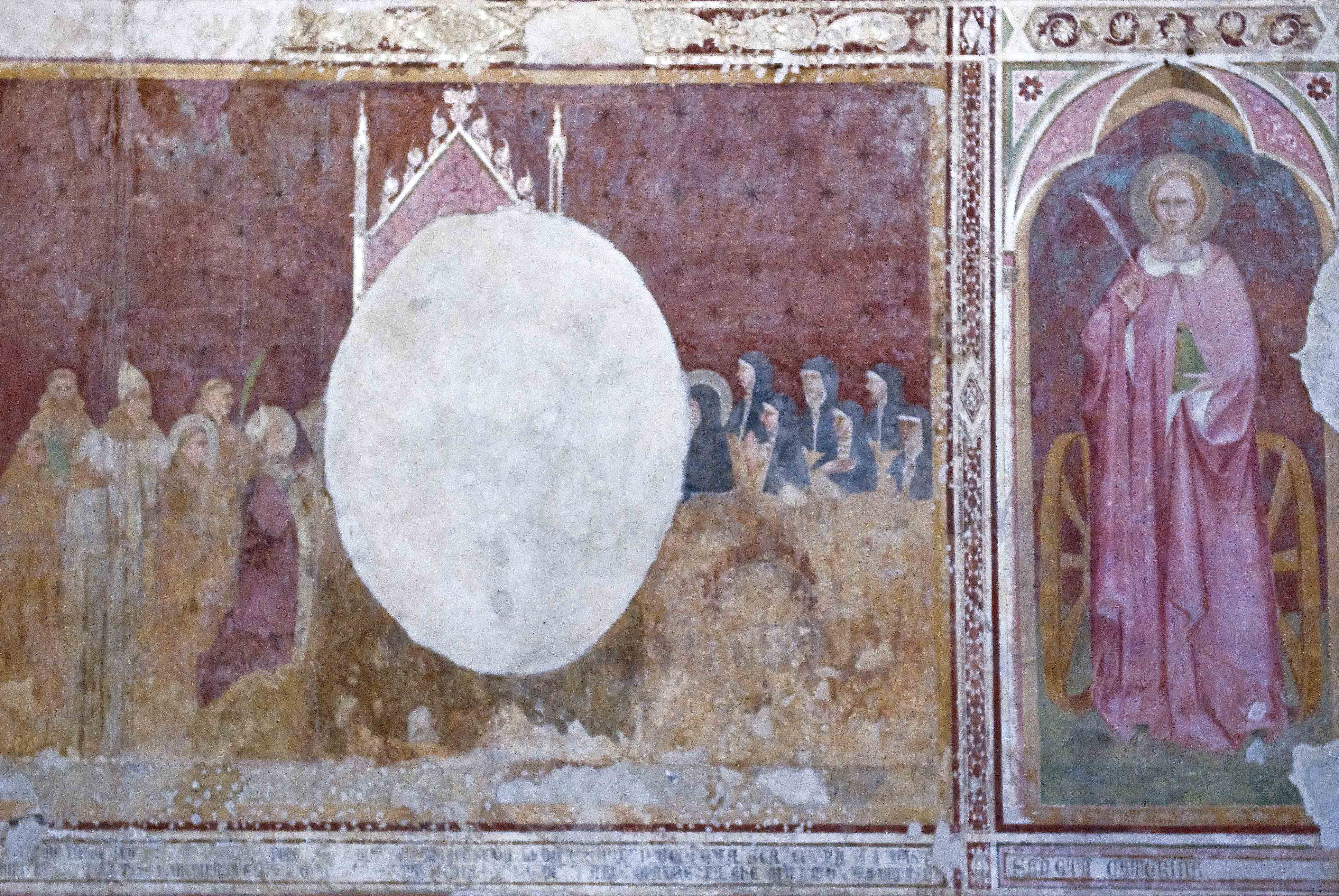 Maestà, affresco nella chiesa di santa lucia al Borghetto, Tavarnelle Val di Pesa